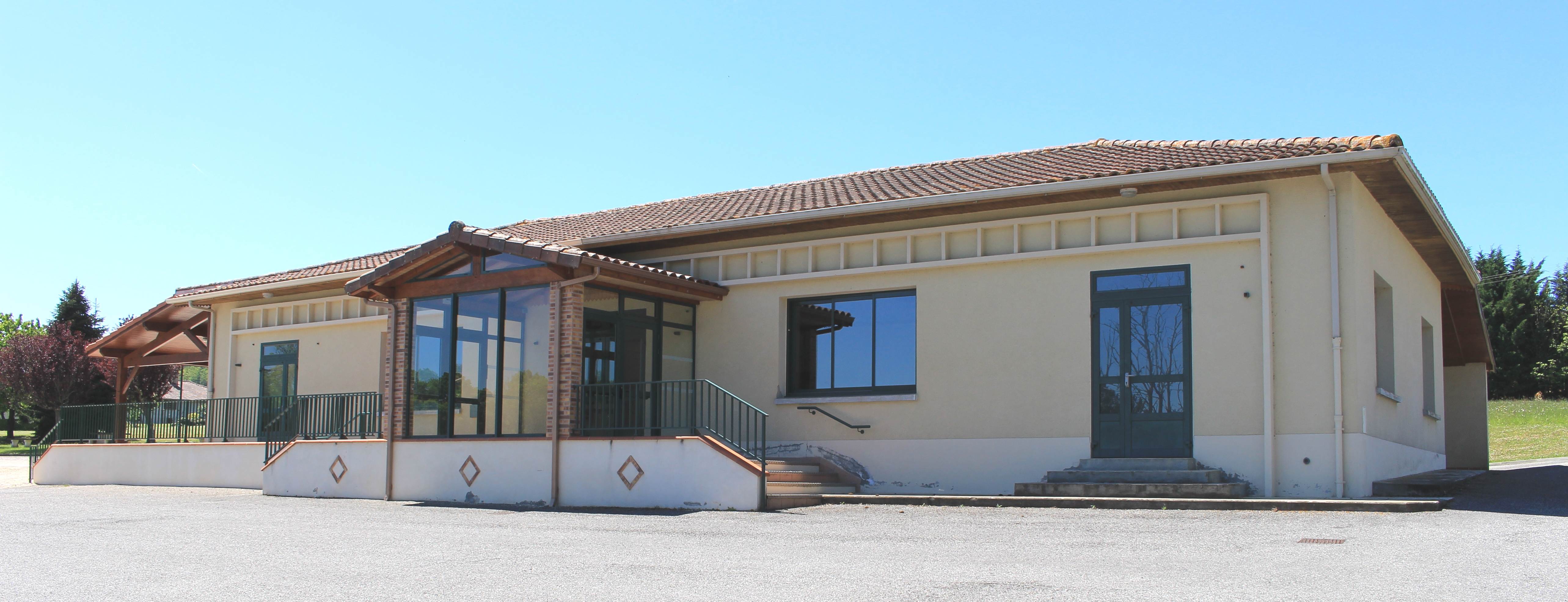 Salle des fêtes de Lustar (Hautes-Pyrénées)